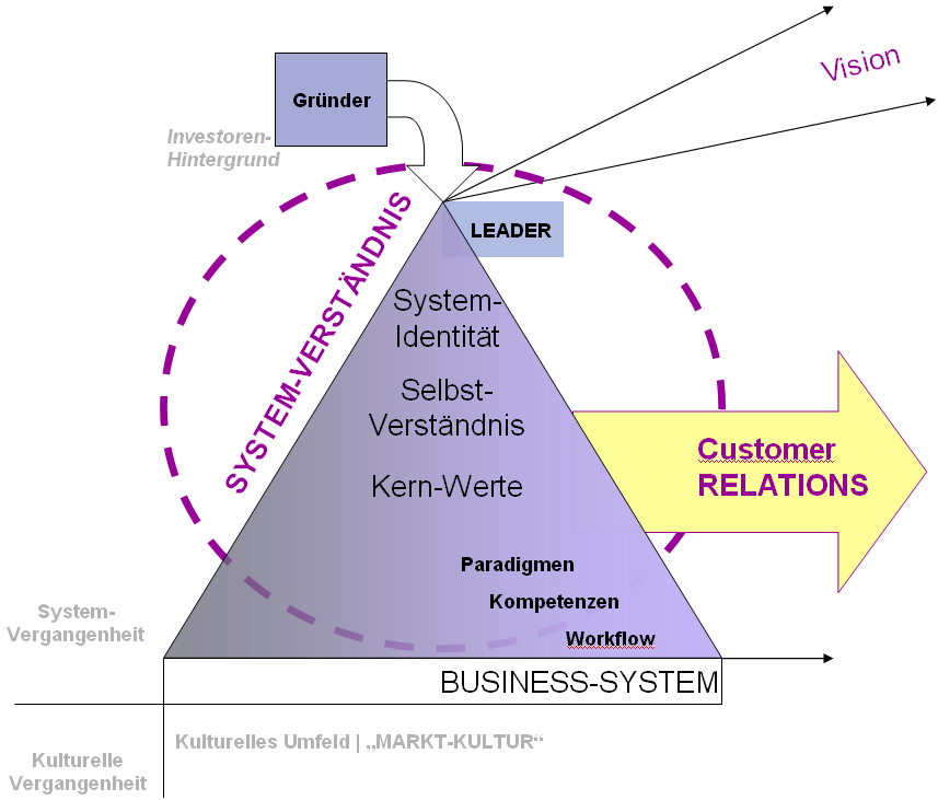 System-Identität und Selbstverständnis (Business-System)